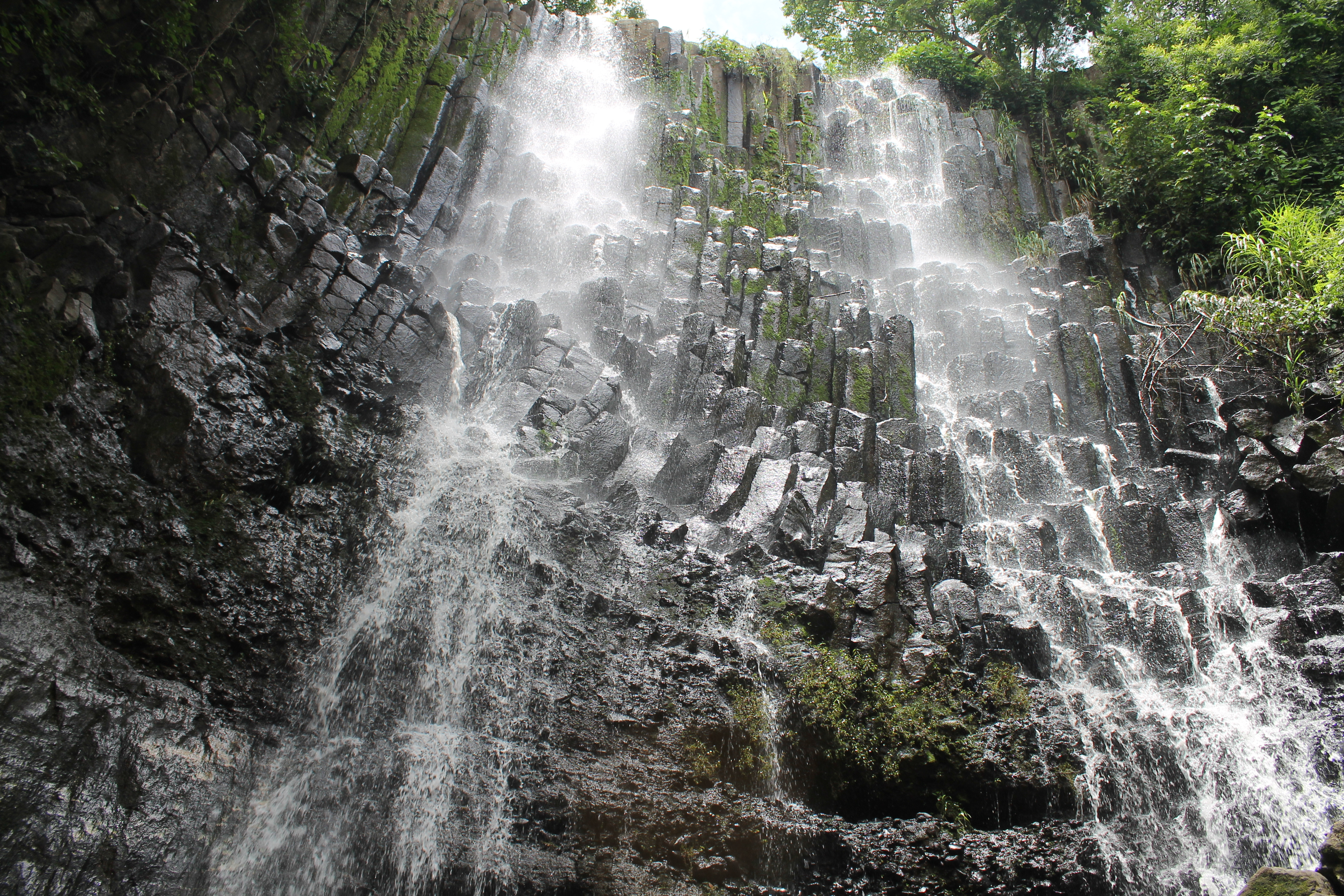 Cascada los Tercios en el mes de Agosto, cuando tiene agua.